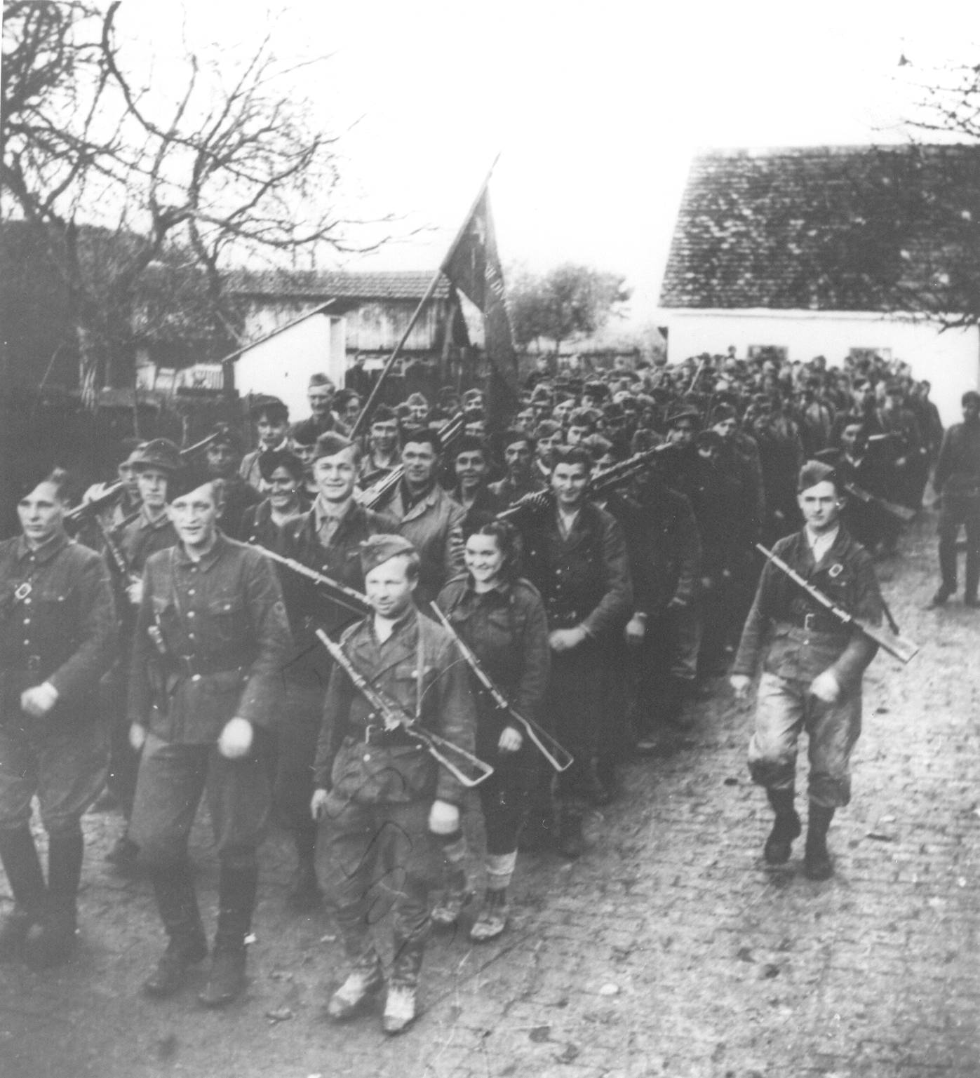 4-й батальон Осиекской ударной бригады, осень 1944 года